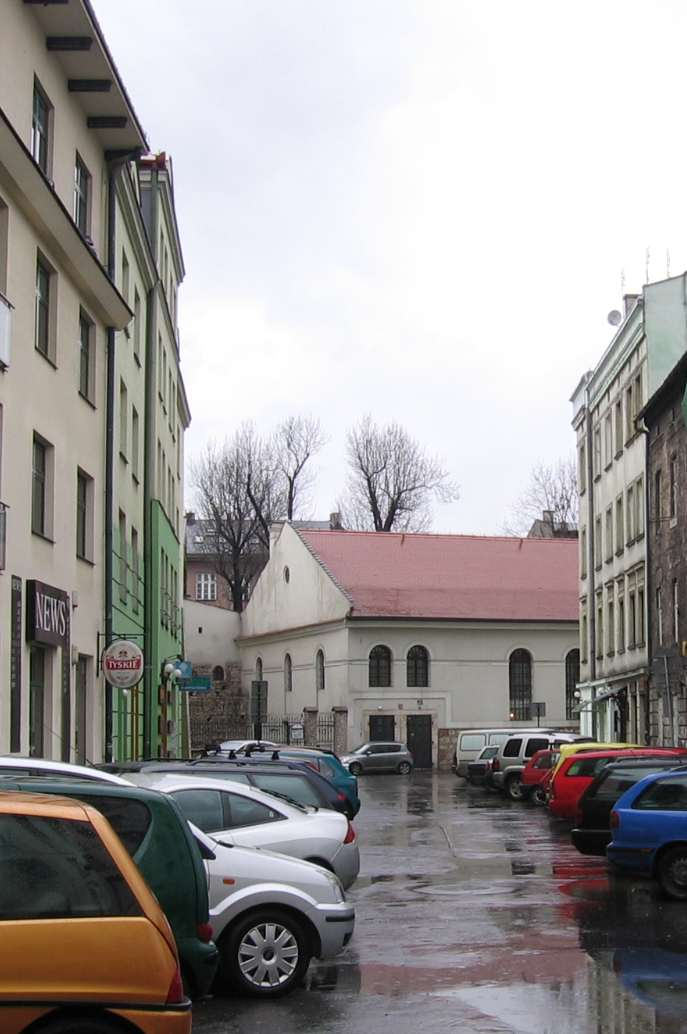 Synagoga Kupa w Krakowie Author: Wikipedysta:Birczanin